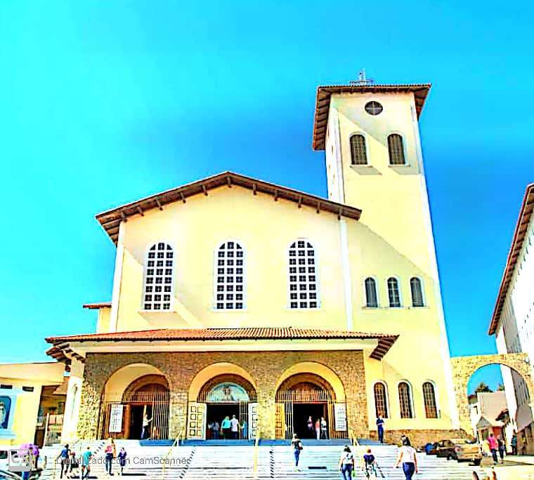 Catedral de São Miguel Paulista